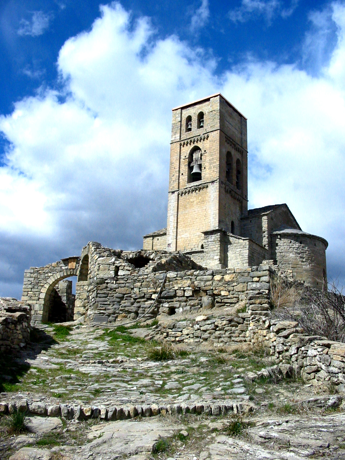 Iglesia de Montañana (Puente de Montañana, Huesca, España).